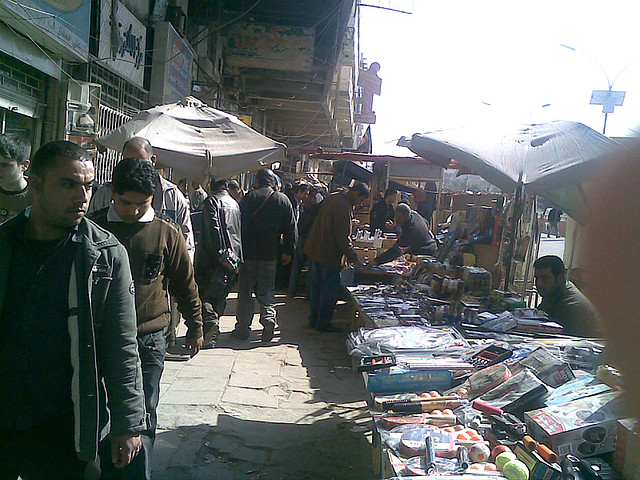 Bab al-Sharji stalls, Baghdad